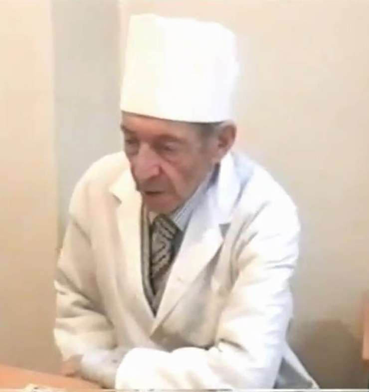 دکتر صفوی درمحل کار خویش بیمارستان شهر دوشنبه- تاجیگستان- ژانویه ۲۰۰۵